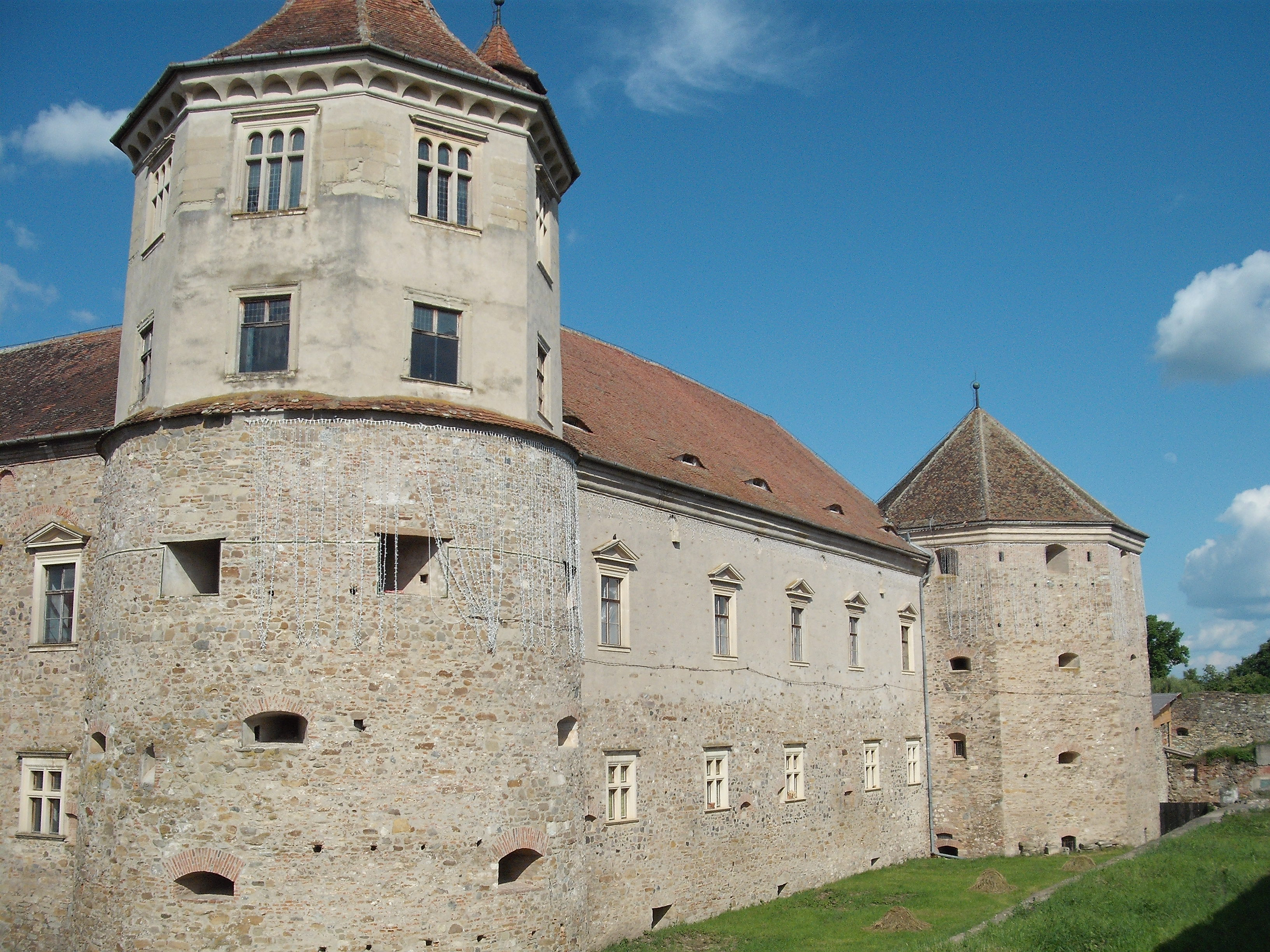 Castelul cu turnurile de colț - incinta interioară 01